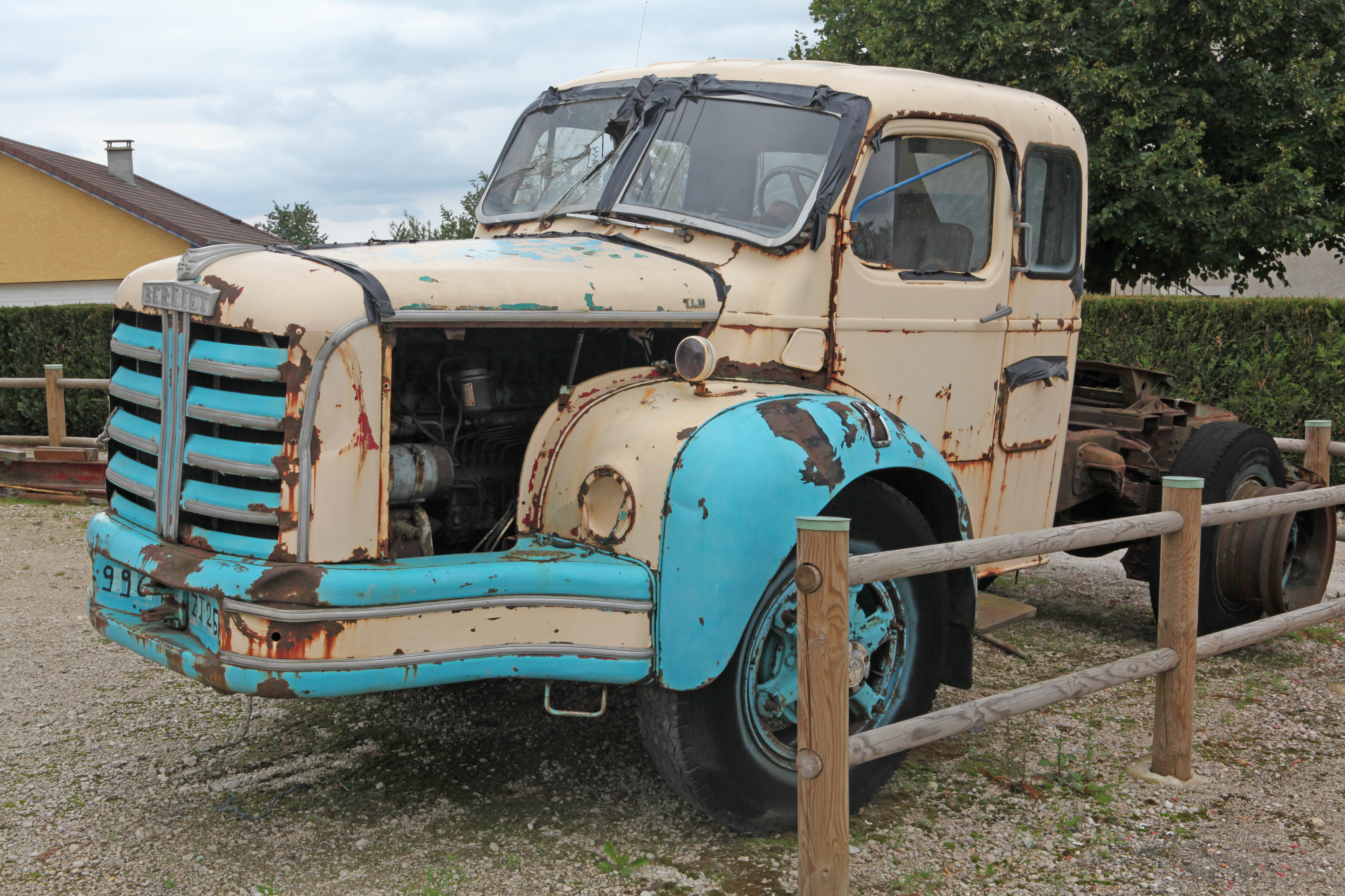 Berliet TLM 15 L